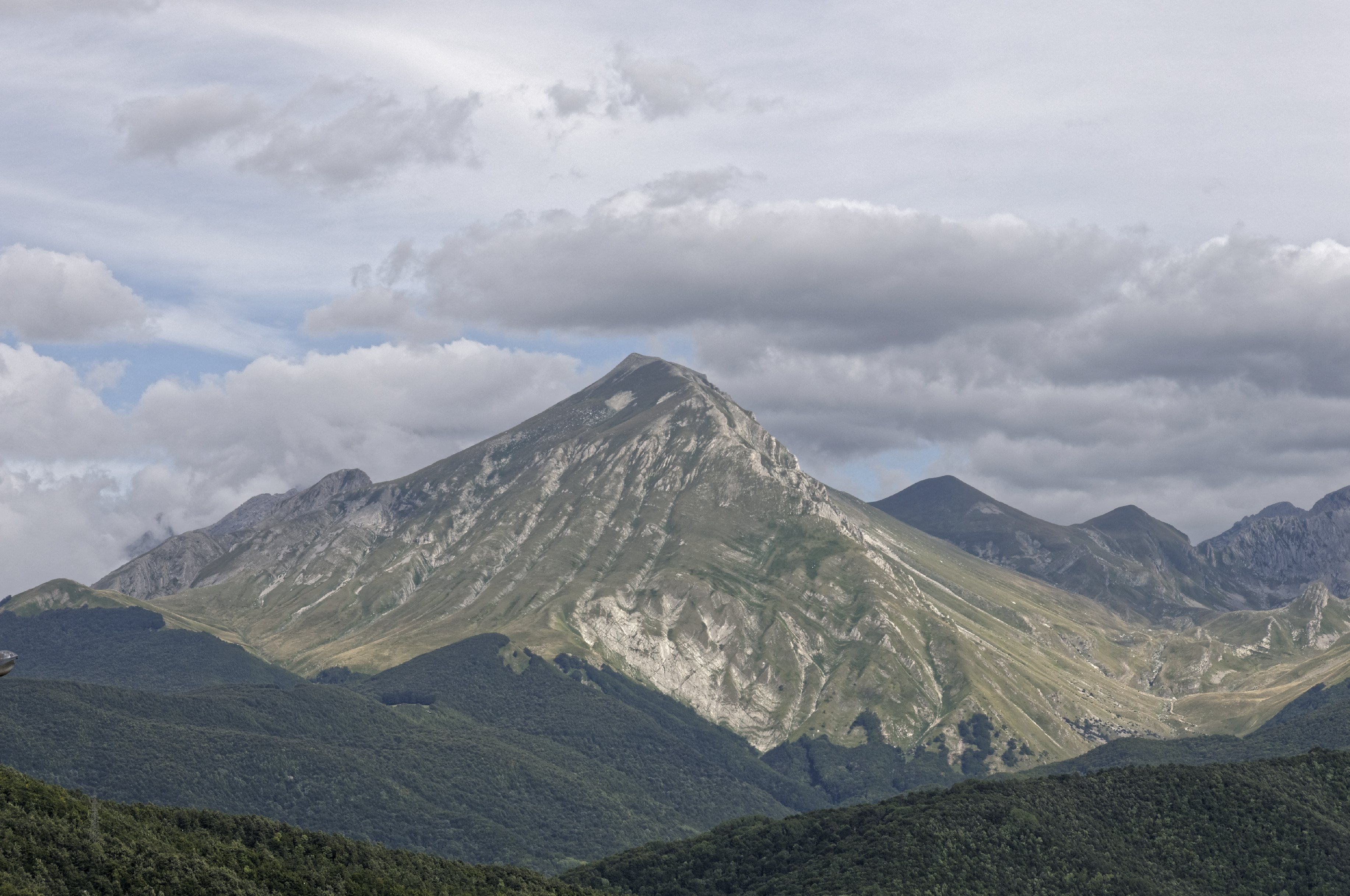 Lago di Campotosto 2015 Dieses Foto entstand in Zusammenarbeit mit Stadtbesichtigungen.de Die Seiten Stadtbesichtigungen.de, der dazugehörige Reise Blog sowie die Facebookseite: Stadtbesichtigungen Rom dürfen dieses Bild für Ihre Veröffentlichungen ohne den Hinweis auf Wikipedia, Commons bzw der Lizenz verwenden. Die Verantwortlichen habe von mir (Ra Boe) die Originaldaten zur freien Verfügung übermittelt bekommen.